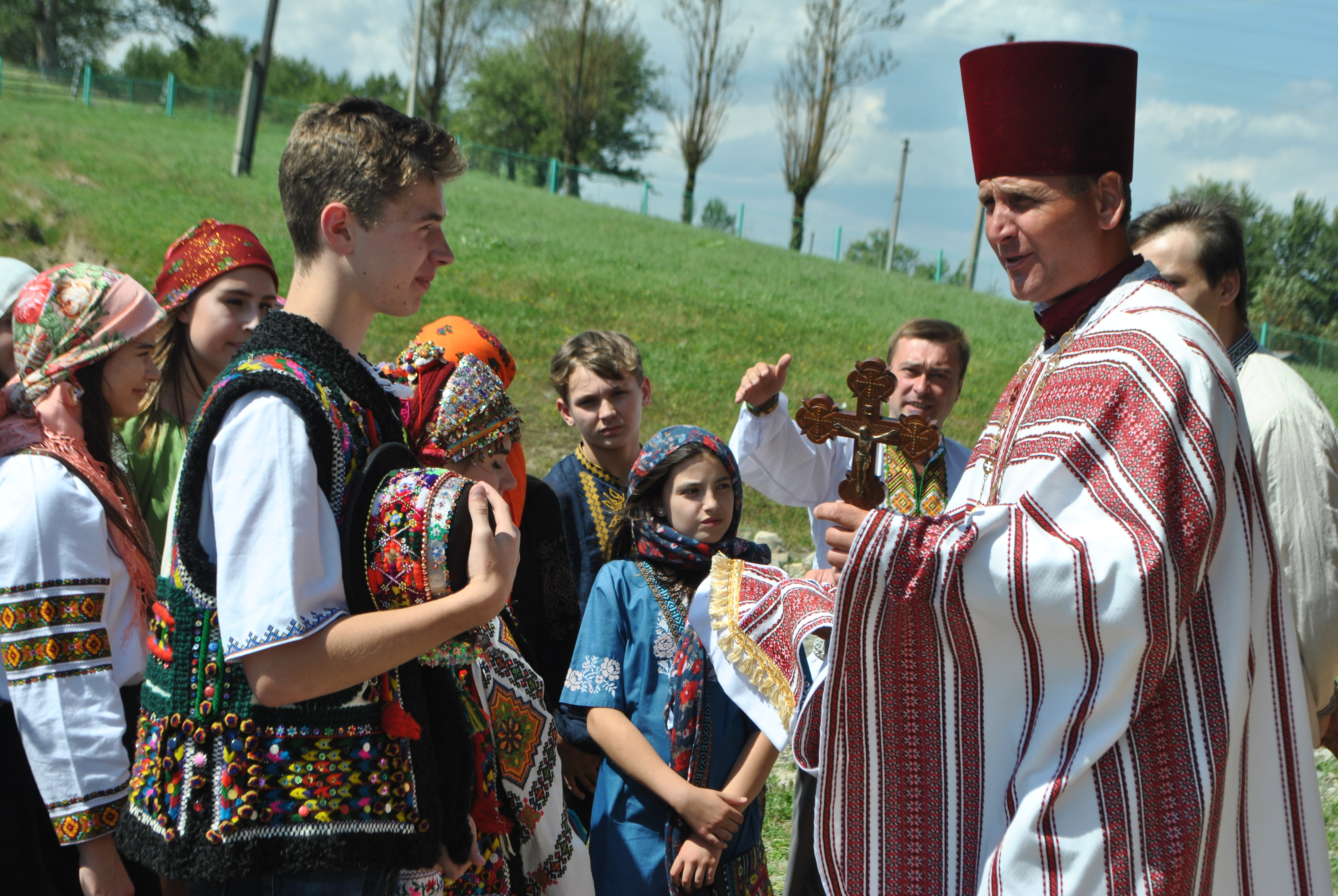 Показове весілля для української діаспори з Канади у с.Буковець